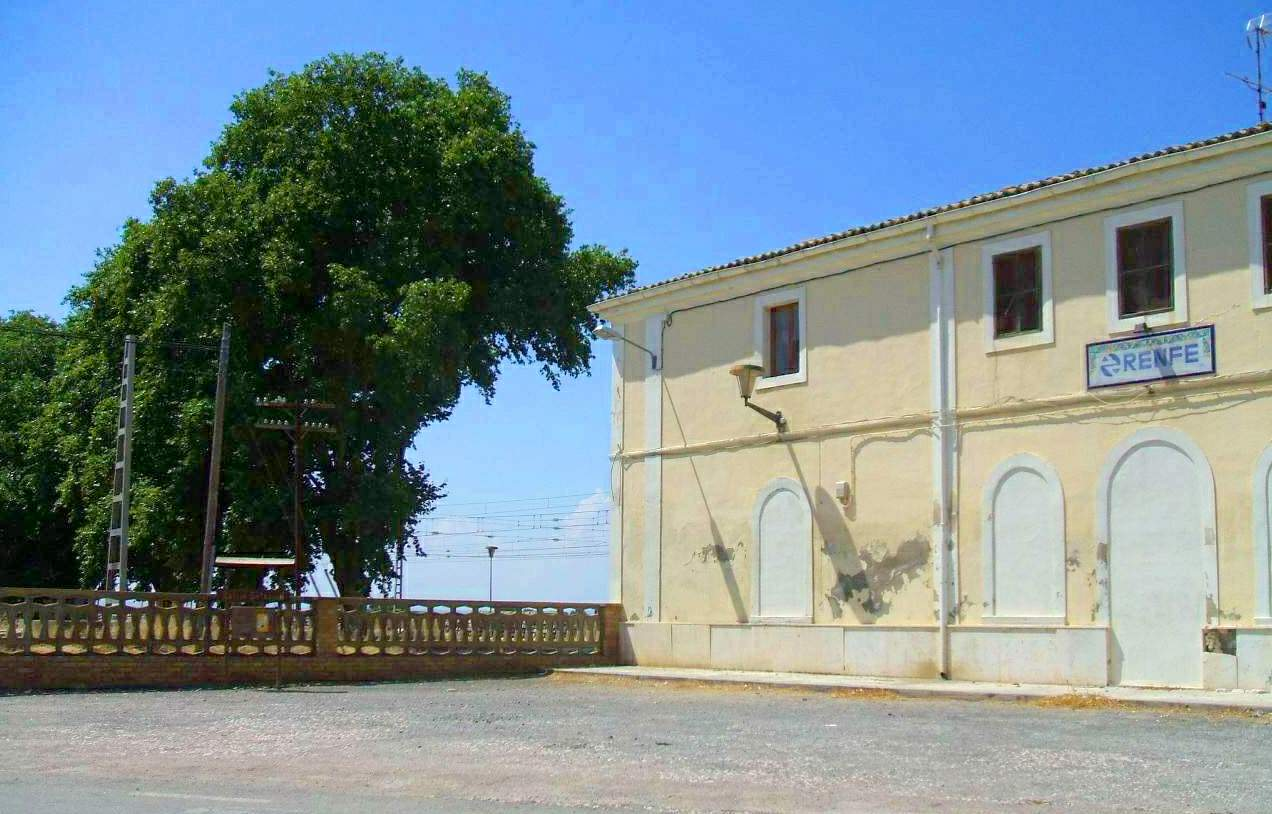 Estación de Sariñena (Huesca)